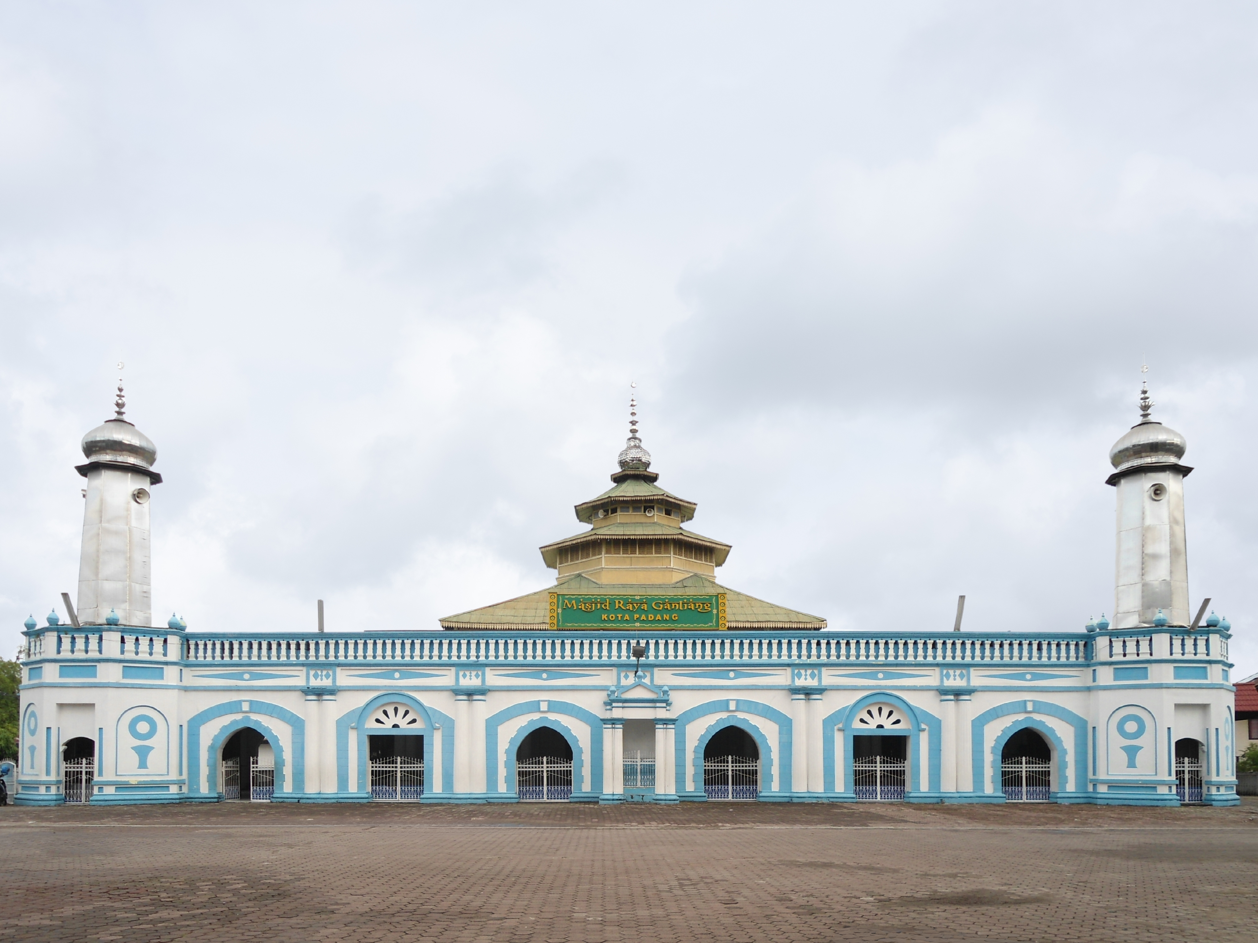 Masjid Raya Ganting